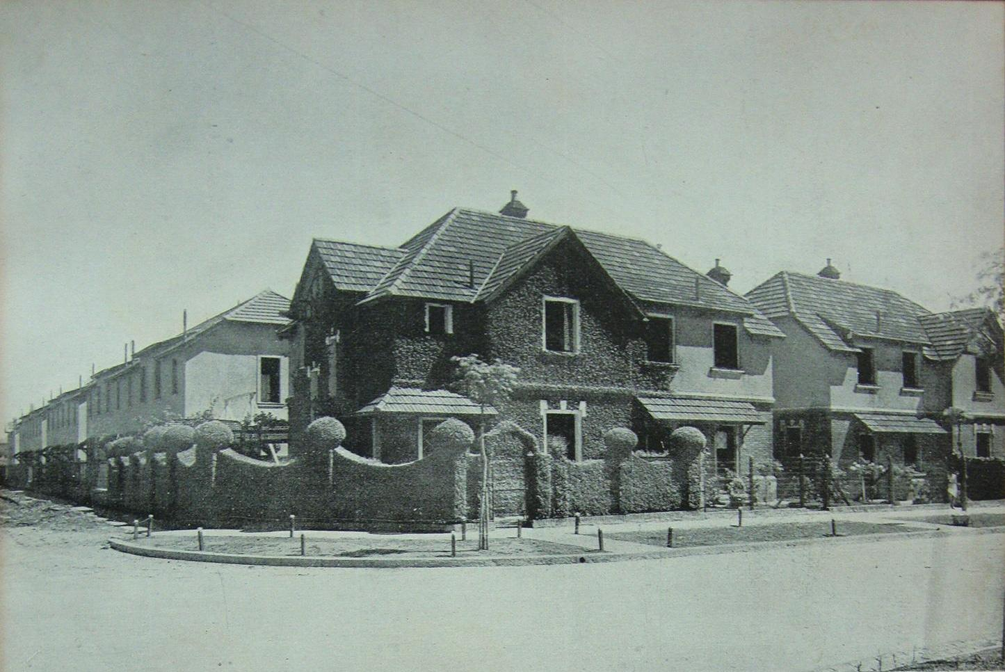 Vista de las casas del Barrio Parque "Guillermo Rawson" construido por la Comisión Nacional de Casas Baratas en el barrio de Agronomía. Ciudad de Buenos Aires, Argentina.